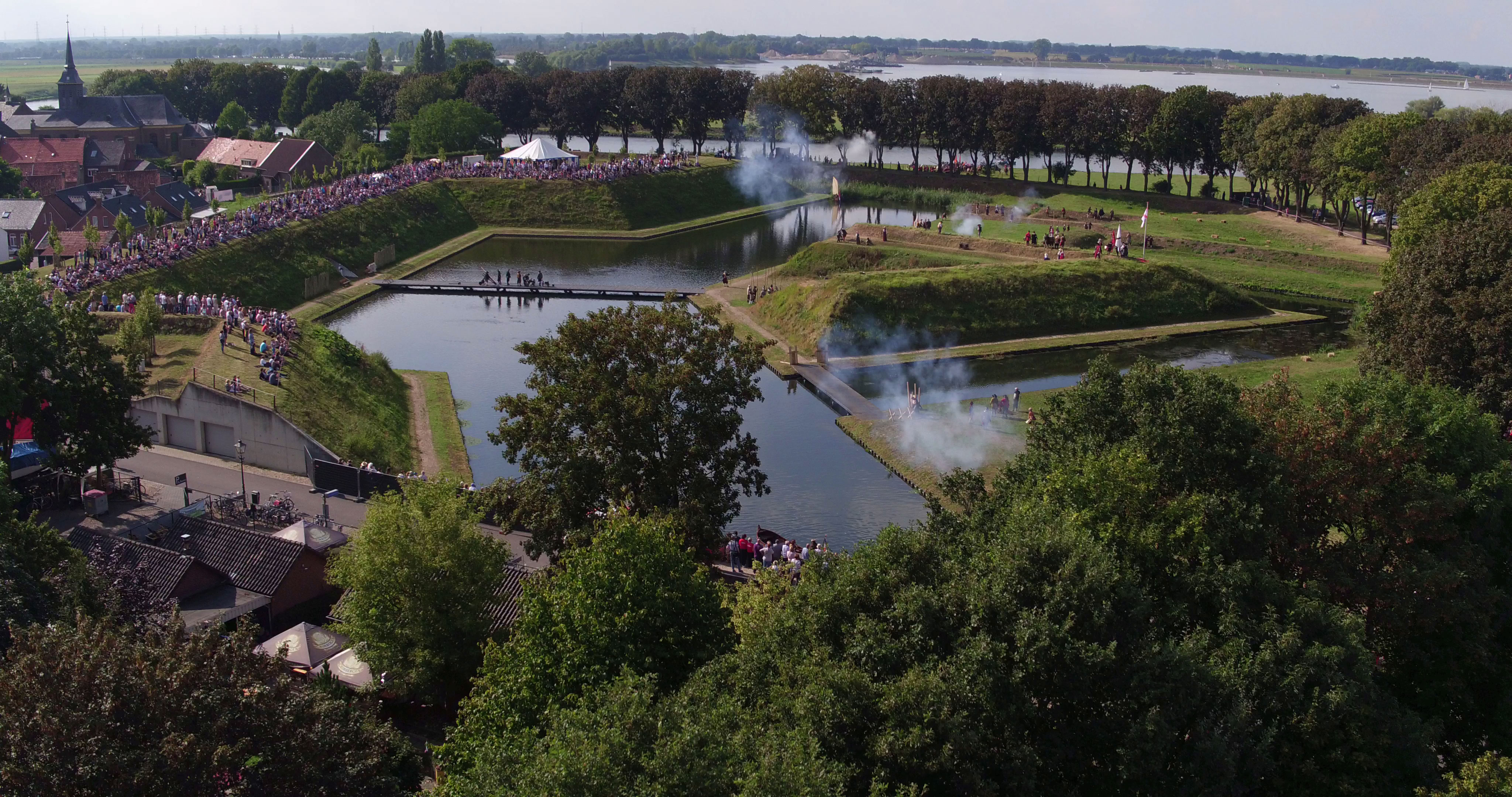 De Slag om Stevensweert werd op 17 & 18 september 2016 nagespeeld op de vestingwerken